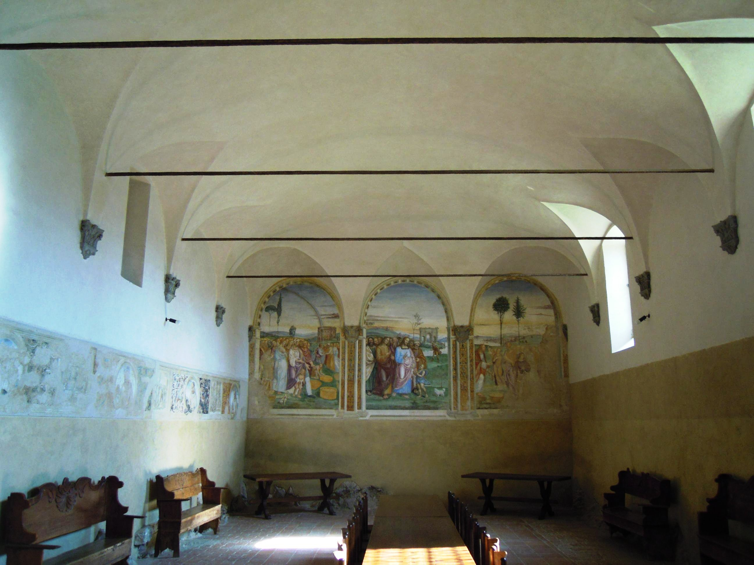 Monastero di Sant'Anna in Camprena, situato all'interno del comune di Pienza, in provincia di Siena, Toscana.